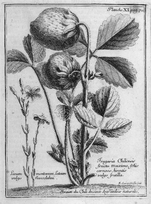 [Illustrations de Relation du voyage de la mer du Sud aux côtes du Chili et du Pérou fait pendant les années 1712, 1713, et 1714] / N. Guérard, Amédée François Frézier, dess. ; Fonbonne, J-B Scotin, grav. ; Amédée François Frézier, aut. du texte